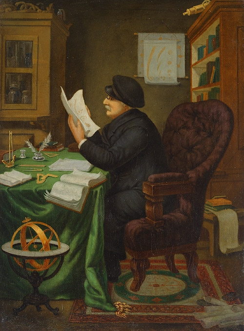 Портрет на д-р Петър Берон